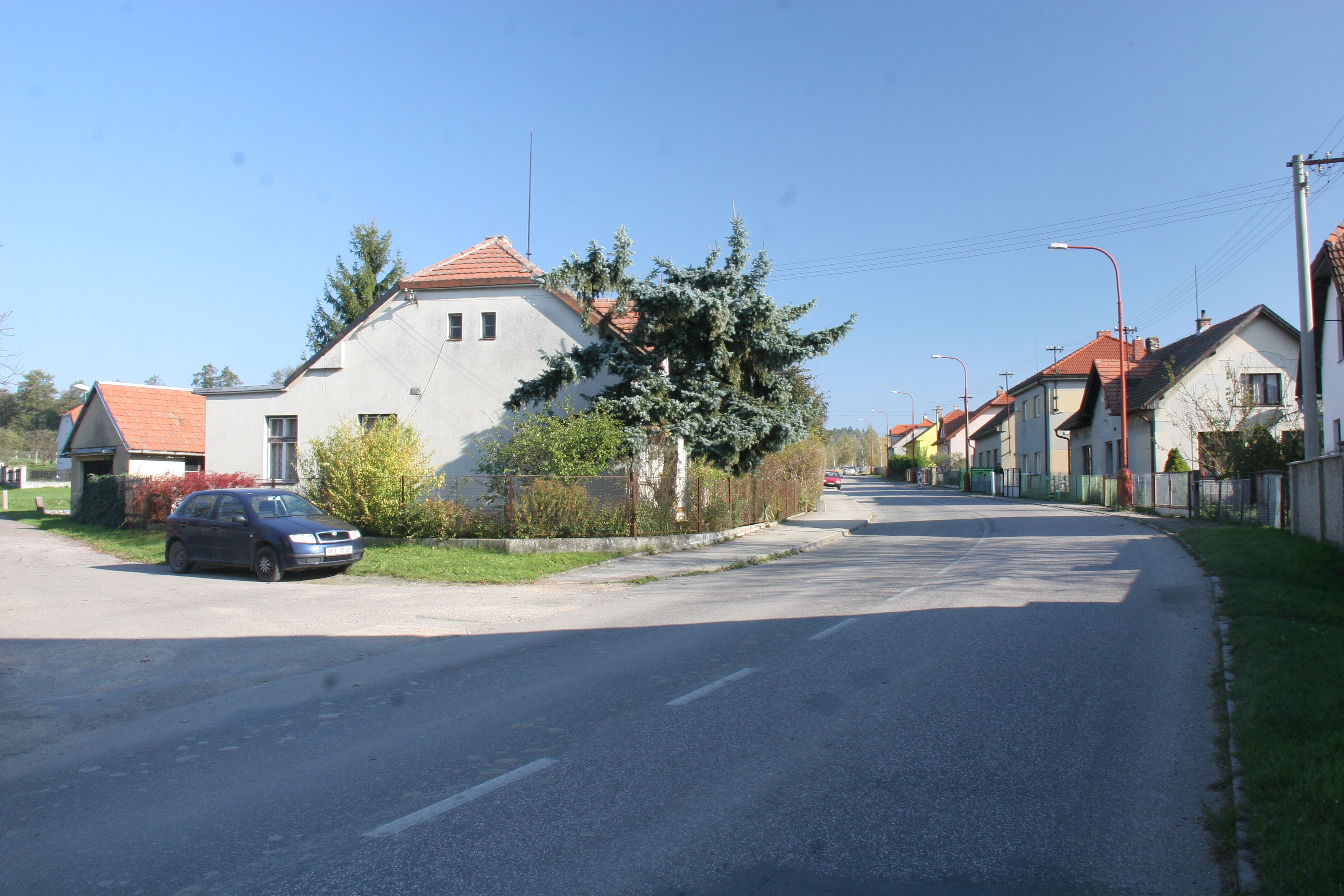 Dobříkov čp. 97